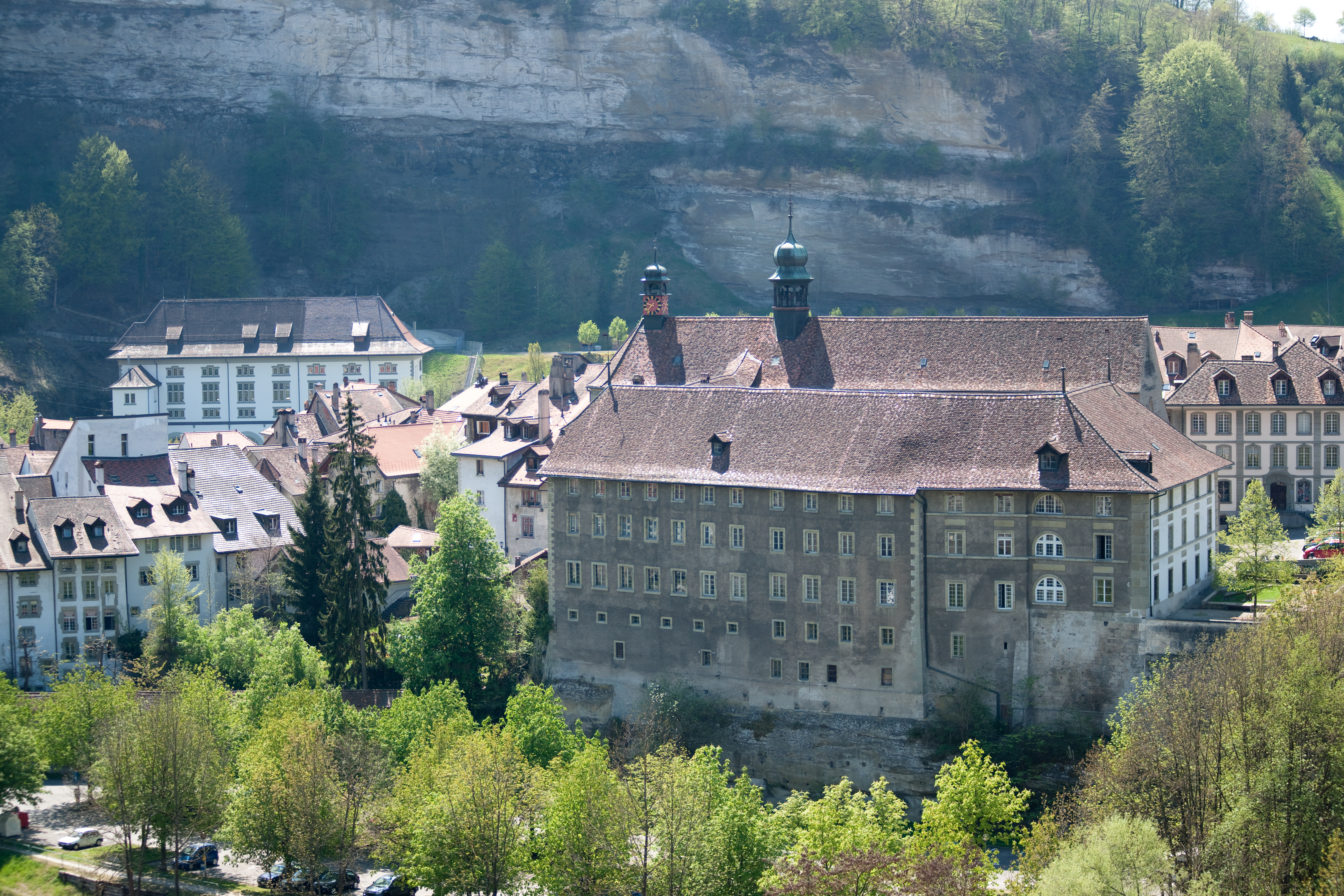 Vieille ville de Fribourg. Le couvent des Augustins depuis le pont de Zaehringen.